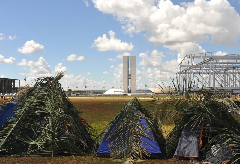 Brasília - Acampamento Terra Livre. A Articulação dos Povos Indígenas do Brasil (APIB) reúne na Esplanada dos Ministérios mais de 800 lideranças indígenas para discutir a violação aos direitos indígenas e reivindicar do governo compromissos para superar a situação.